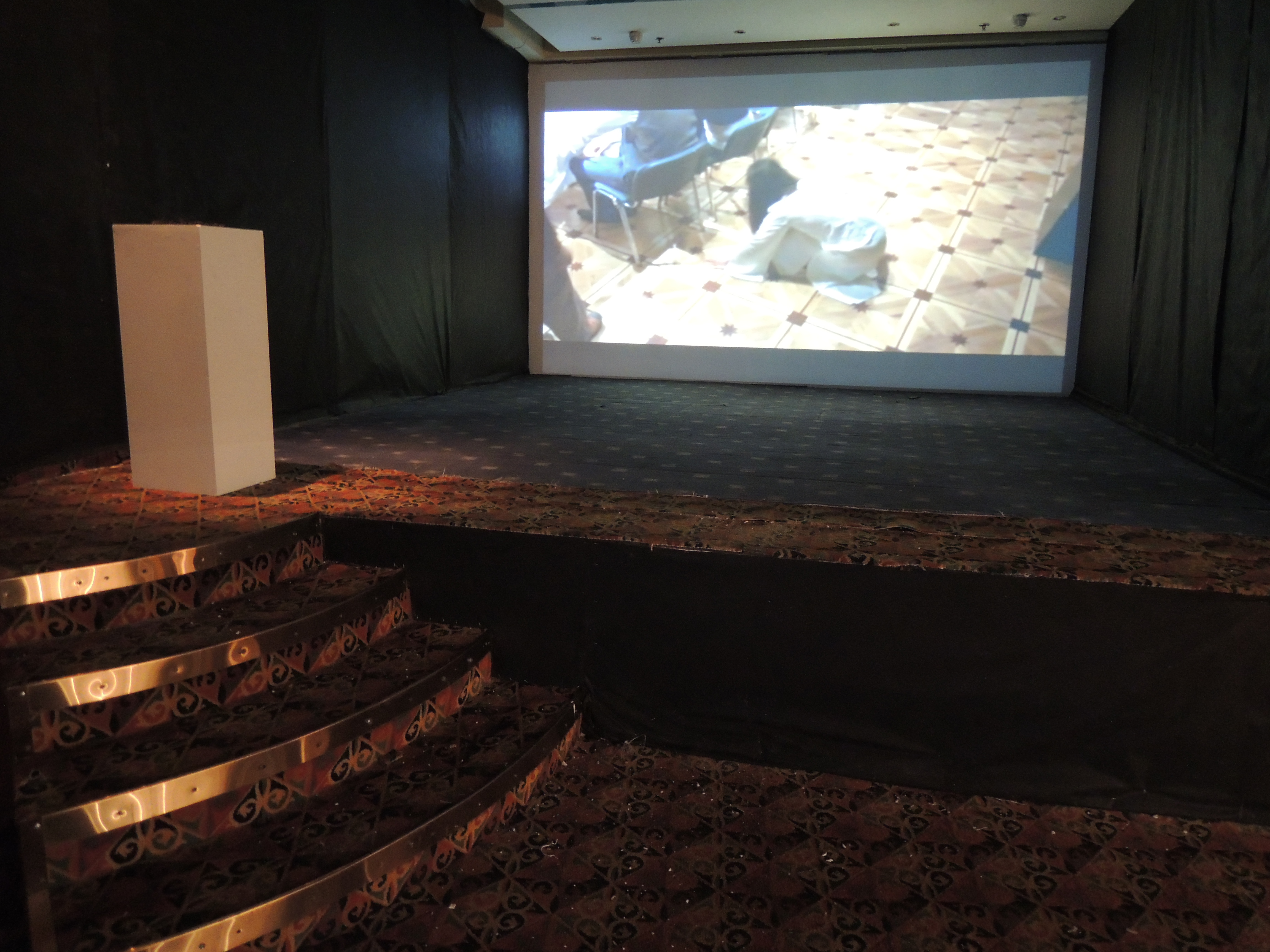 Кинотеатр "Ударник". 2012 год: сразу после того, как он стал собственностью фонда "Артхроника", которая начала производить реконструкцию интерьеров, в которых располагалось казино. Пресс-показ Премии Кандинского.